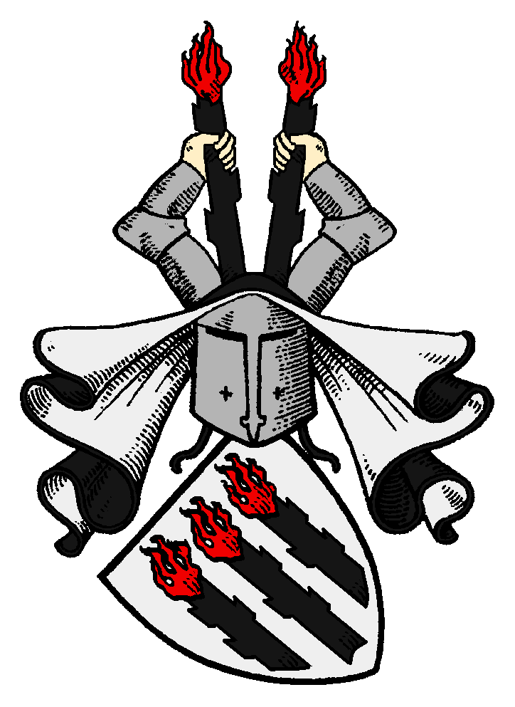 Wappen der Löschebrand (Loeschebrand; vgl. Zedlitz-Neukirch, Neues preußisches Adelslexicon, Band 3